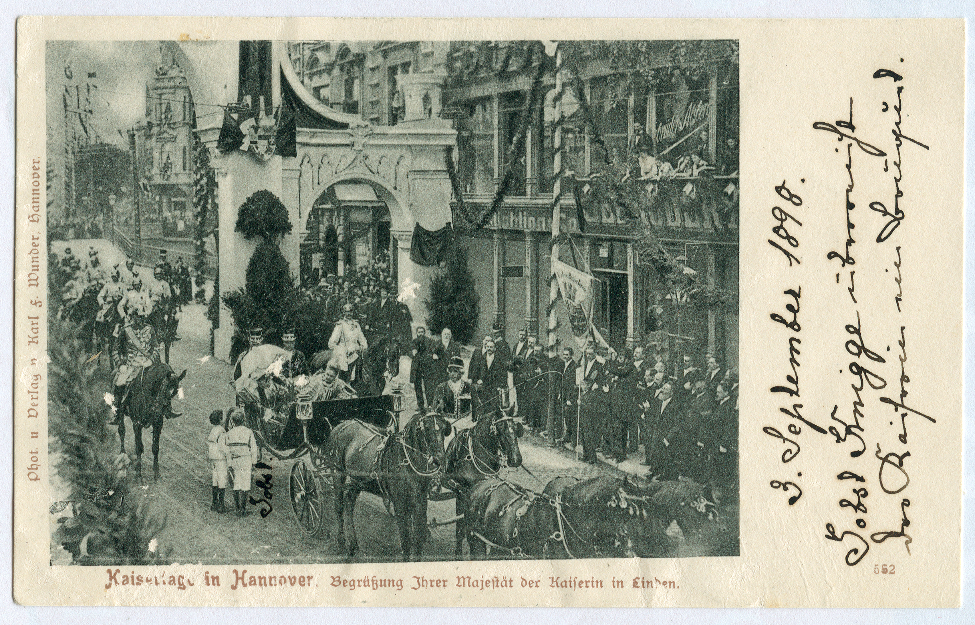 Kaisertage in Hannover: Begrüßung Ihrer Majestät der Kaiserin in Linden, Schwarzer Bär. Die Handschrift auf der Ansichtskarte lautet: "3. September 1898: Jobst Knigge überreicht der Kaiserin ein Bouquet." Ein der beiden Jungen im Matrosenanzug ist mit "Jobst" gekennzeichnet. Im Hintergrund ist die ehemalige Ihmenbrücke (die spätere Ihmebrücke, heute Benno-Ohnesorg-Brücke) sowie die Bebauung im ehemaligen Ohe-Viertel. Die meisten Männer auf der rechten Bildseite haben ihren Hut gezogen. Die Häuser dahinter stehen heute noch am Schwarzen Bären.